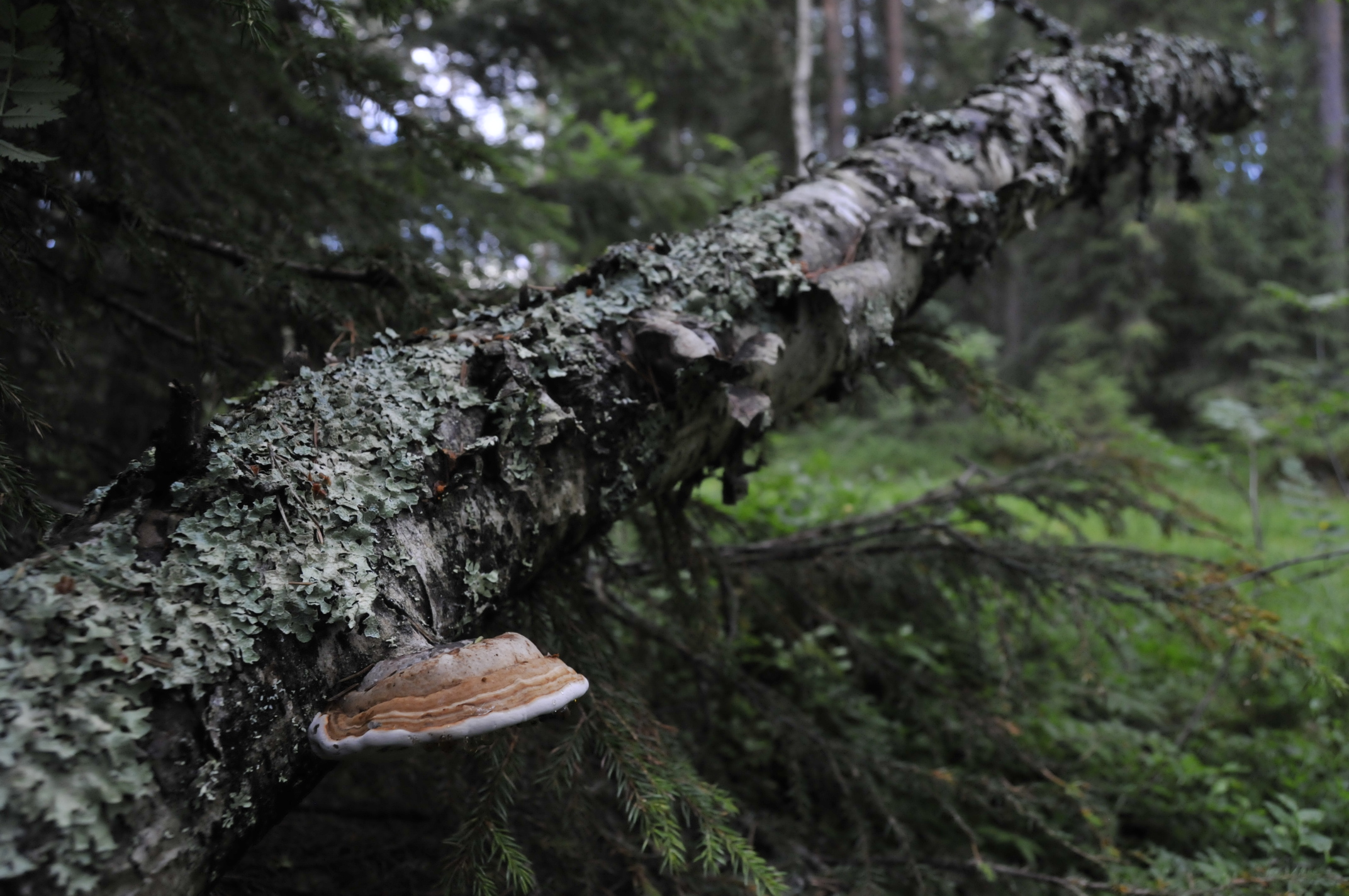 Rannåssjön i Östersund, Jämtland.